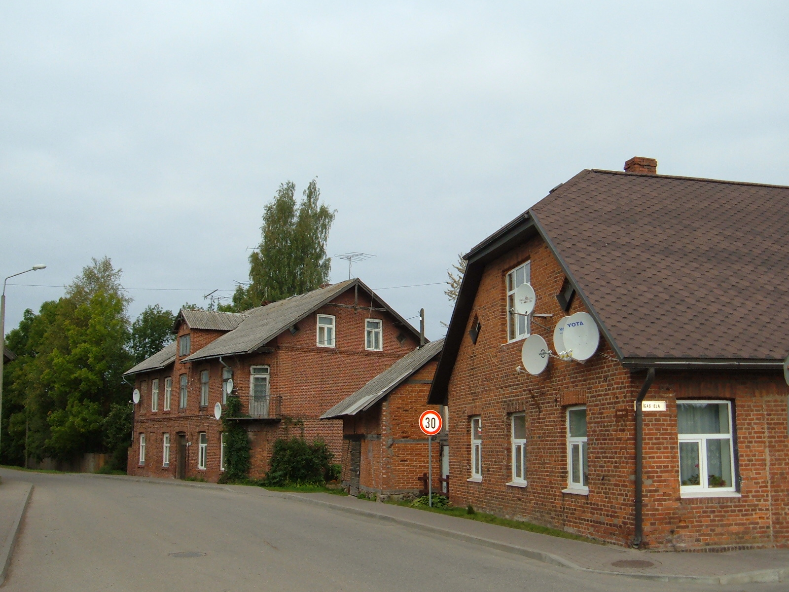 Jūras iela 4 un Rīgas iela 8, Salacgrīva